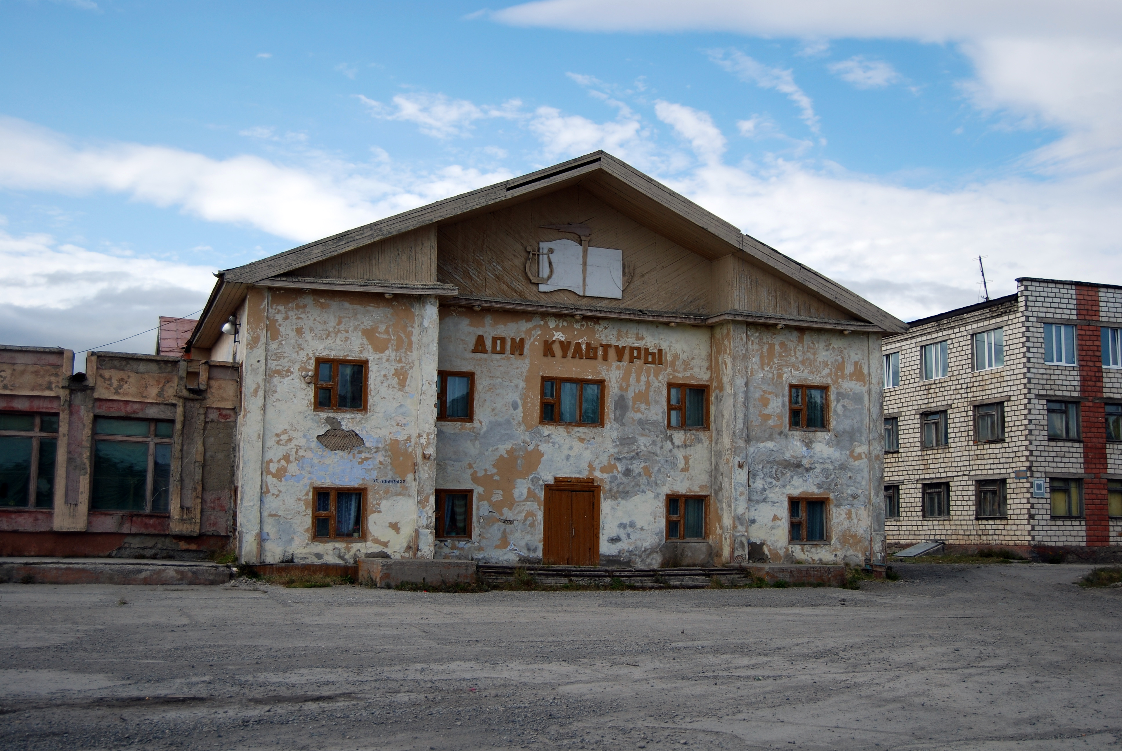 Дом культуры в п. Эвенск